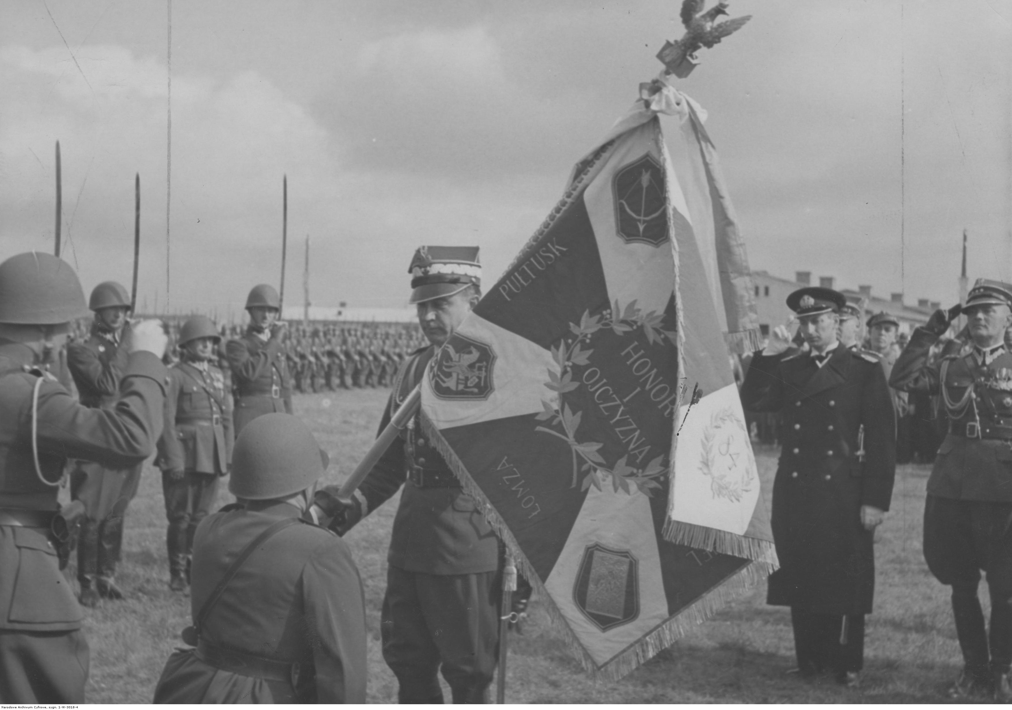 Wręczenie sztandaru 84 Pułkowi Strzelców Poleskich, ufundowanego przez społeczeństwo Polesia. Gen. Tadeusz Kasprzycki wręcza sztandar płk Józefowi Zawiślakowi. Koncern Ilustrowany Kurier Codzienny - Archiwum Ilustracji. Sygnatura: 1-W-3018-4